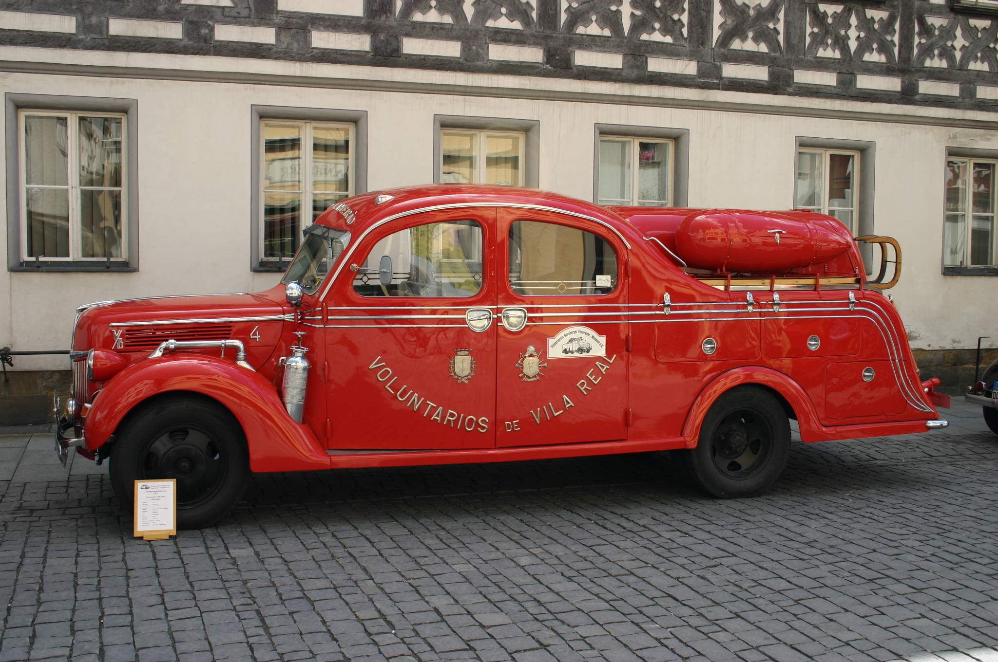 Löschgruppenfahrzeug LF 8 (Vila Real / Portugal)